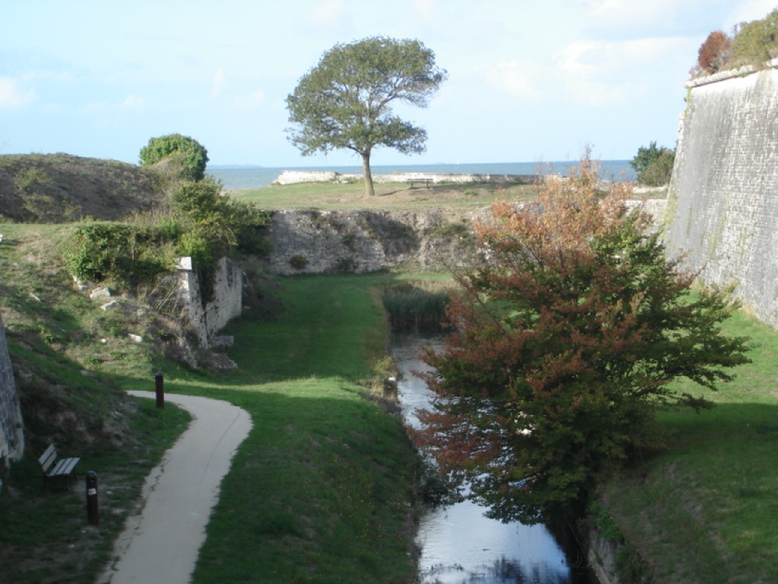 Les fortifications du Chateau d'Oleron. Auteur : Jean-Claude Perez